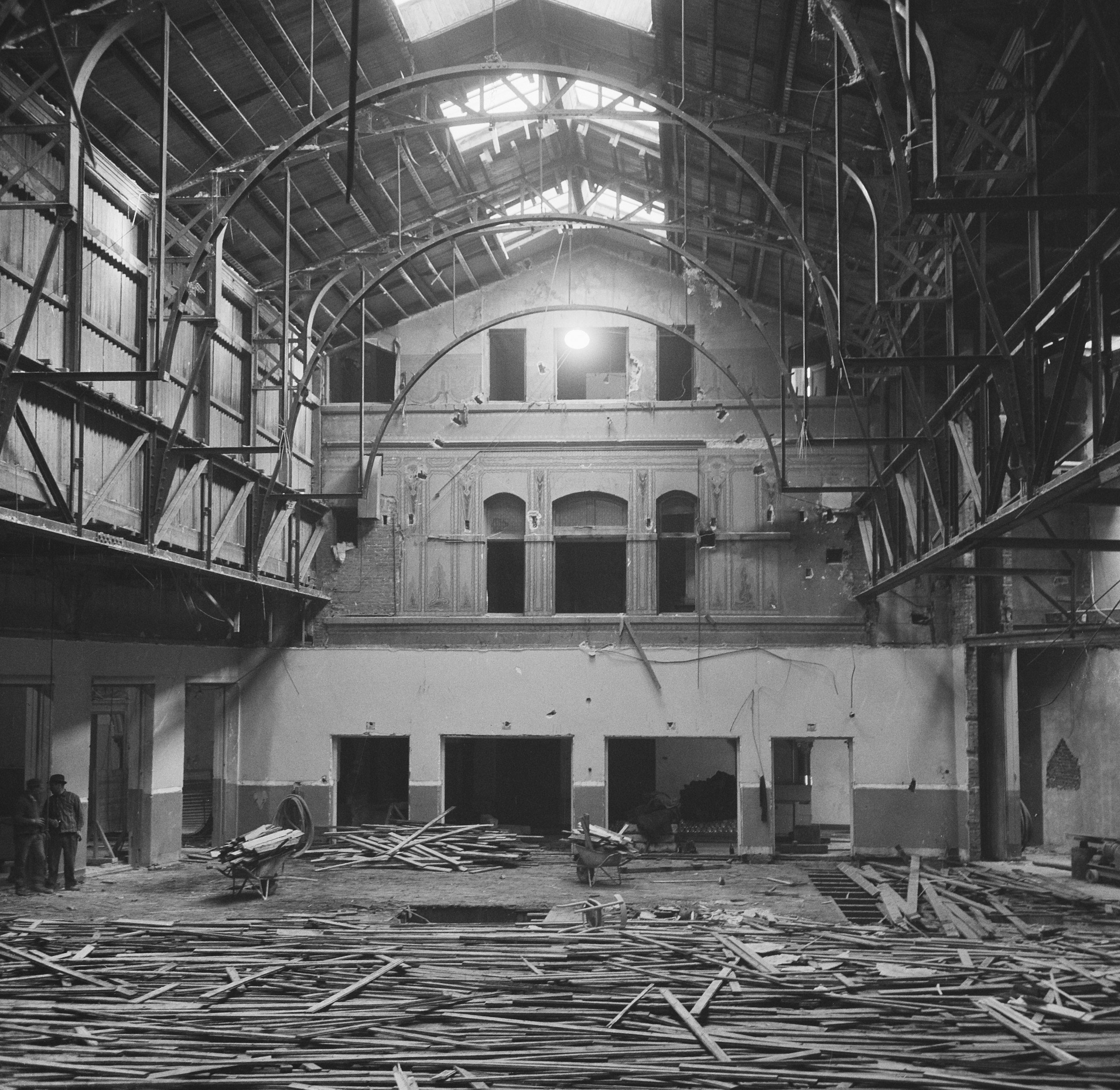 Collectie / Archief : Fotocollectie Anefo Reportage / Serie : [ onbekend ] Beschrijving : Verbouwing Bellevue voor NTS-studio Datum : 4 maart 1965 Trefwoorden : Verbouwingen Instellingsnaam : Bellevue, NTS Fotograaf : Nijs, Jac. de / Anefo Auteursrechthebbende : Nationaal Archief Materiaalsoort : Negatief (zwart/wit) Nummer archiefinventaris : bekijk toegang 2.24.01.03 Bestanddeelnummer : 917-4984